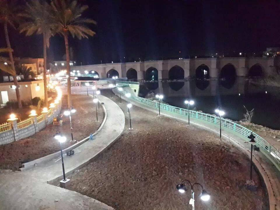 خانقين